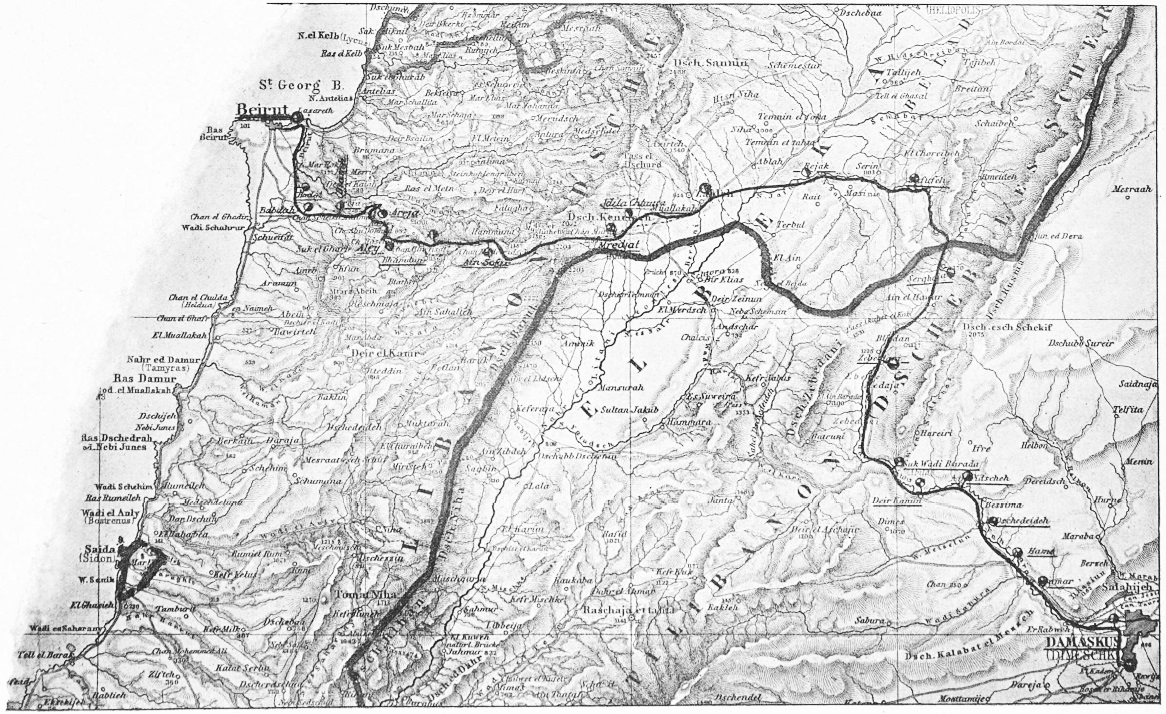 Beirut-Damaskus-Bahn Streckenkarte